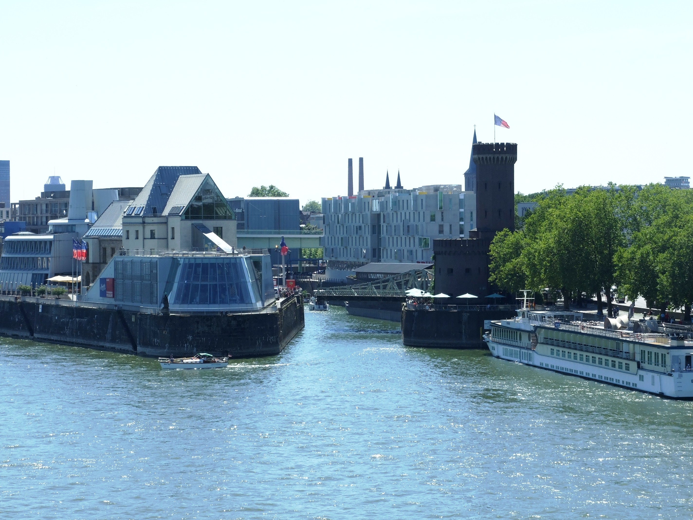 Köln, Malakoffturm von der Deutzer Brücke